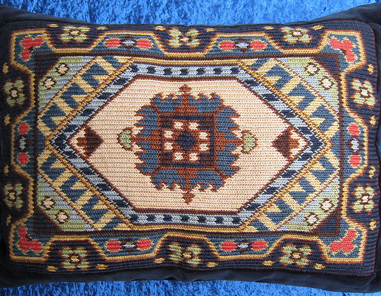 Vysivany gobelinovy koberec